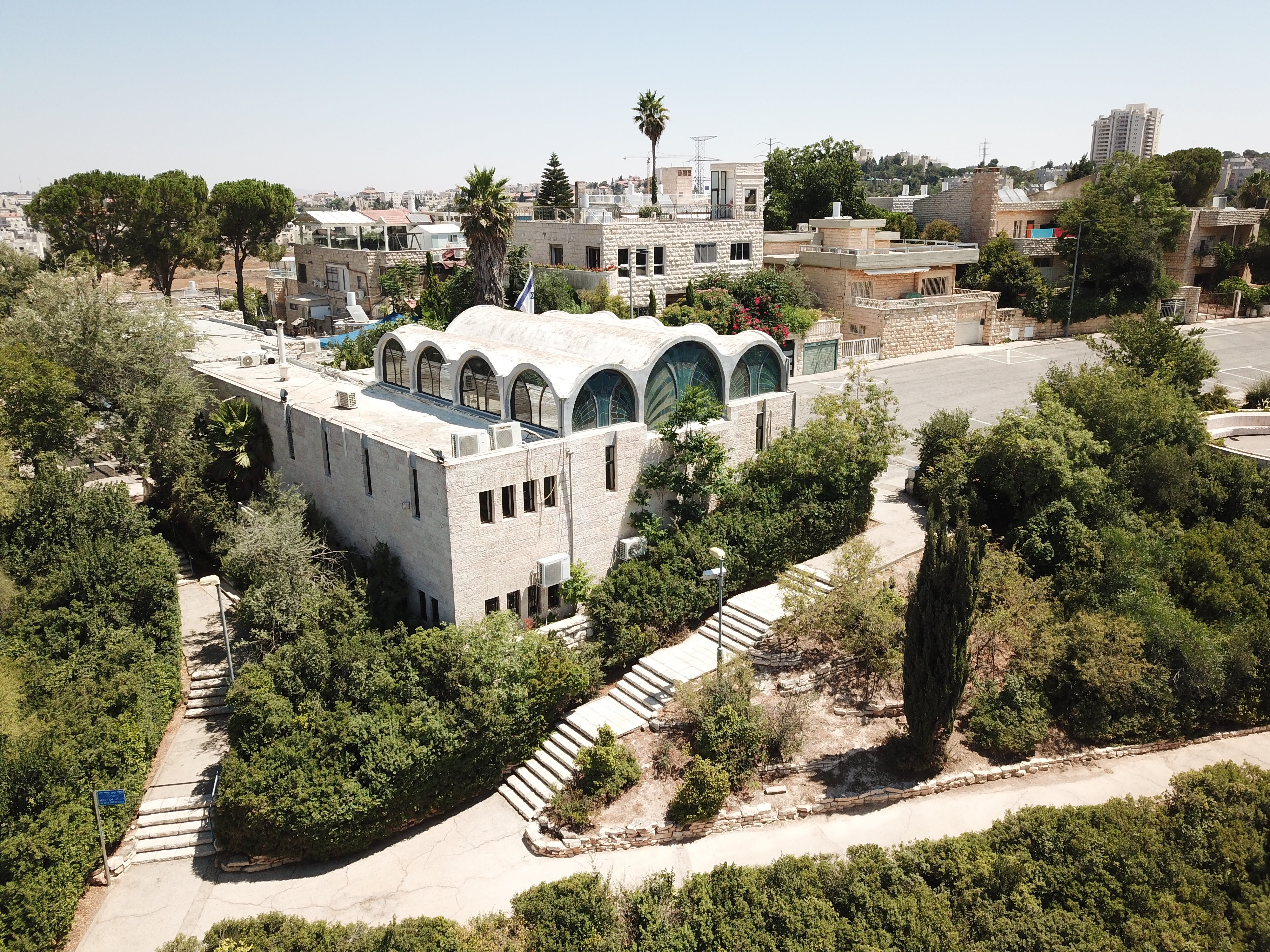 בית הכנסת על שם רייך בגבעת המבתר (2019)